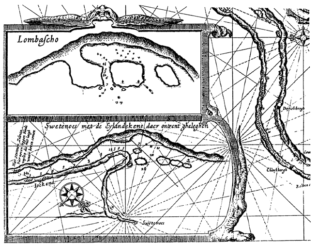 Лука Вагенер. Карта Кольского залива (1612)